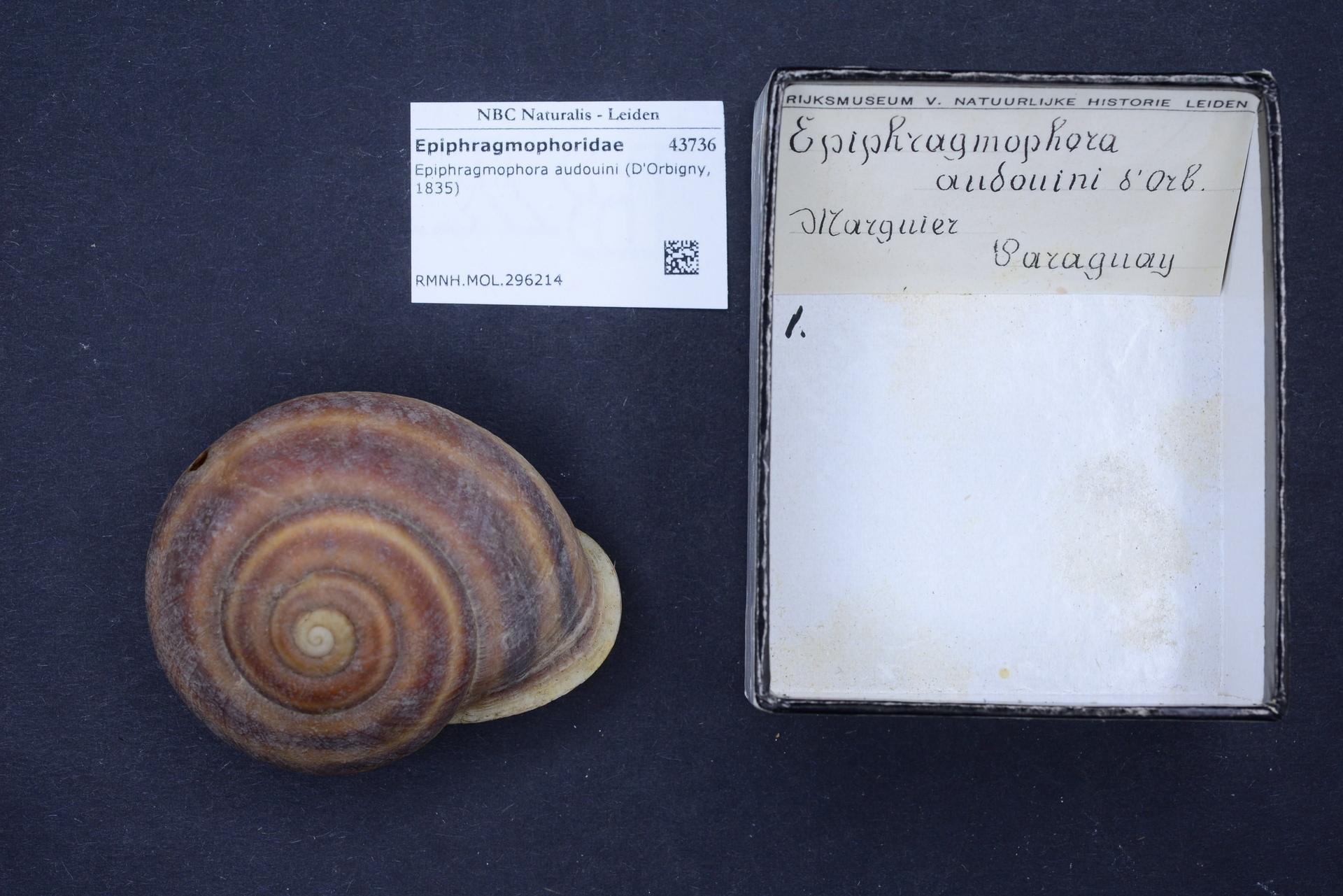 Epiphragmophora audouini (D'Orbigny, 1835)